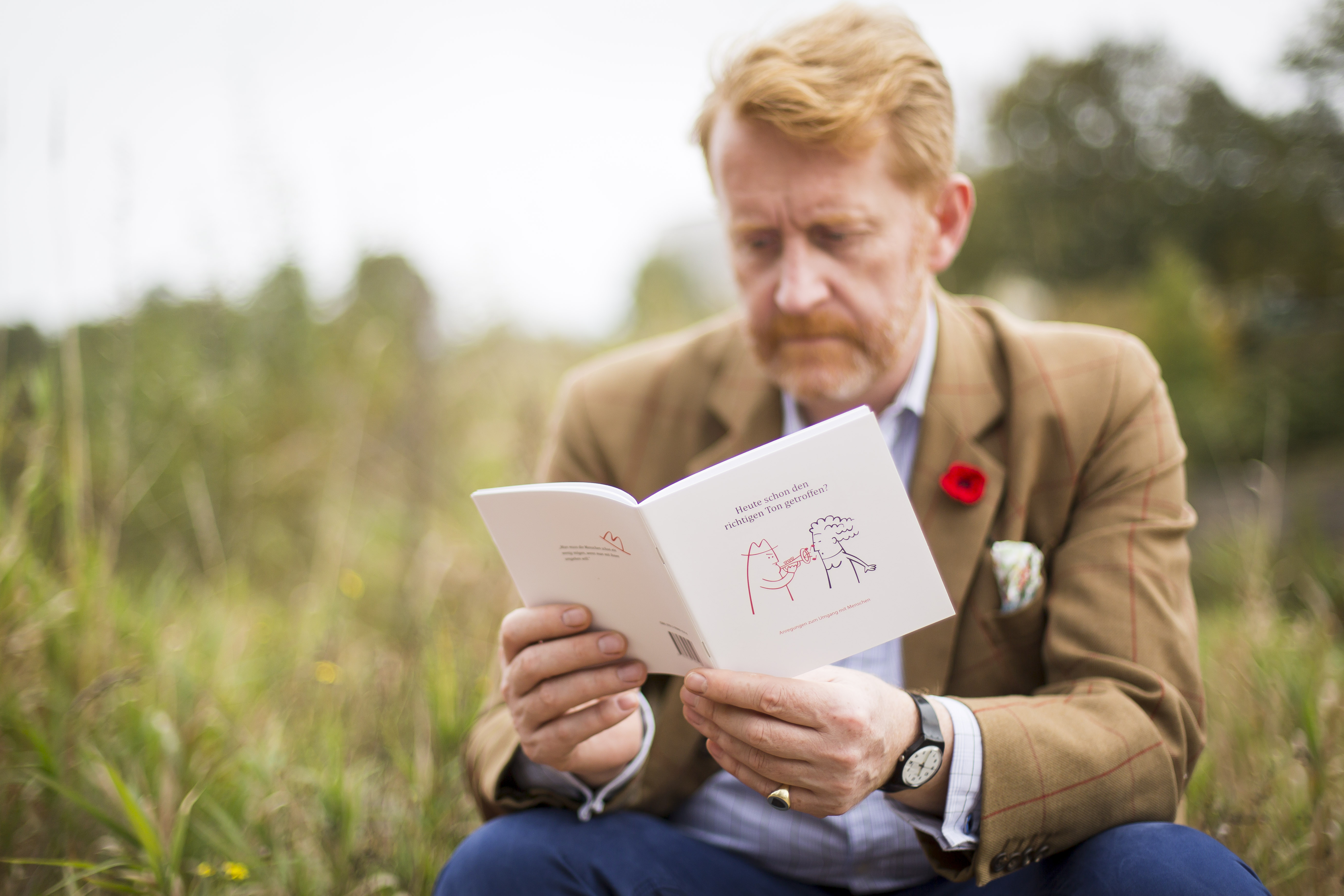 Moritz Freiherr Knigge, lesend, Görlitz 2014